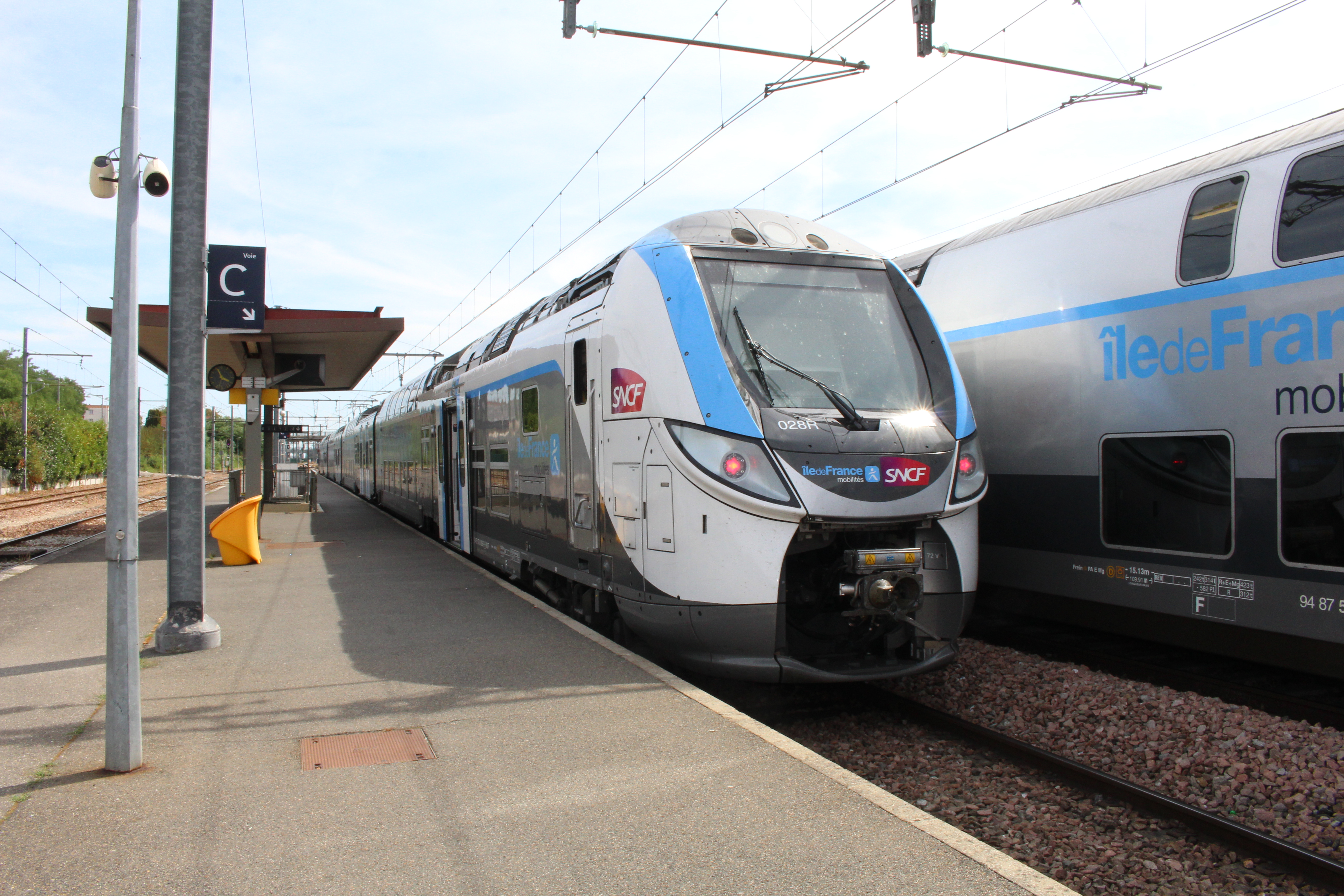 Train Z 57000 de la ligne R du réseau Transilien à l'arrêt en gare de Montargis.